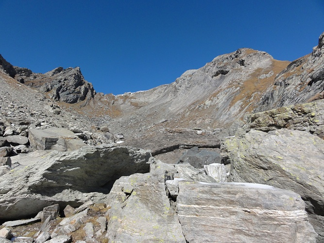 Il vallone che sale al passo della Coppa